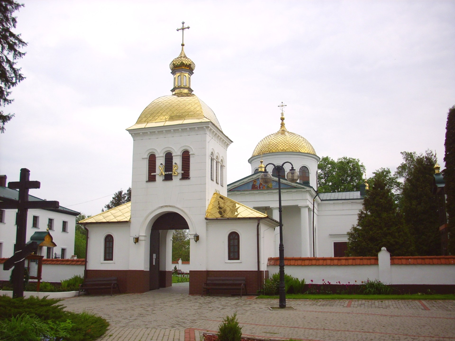 Prawosławny zespół klasztorno-cerkiewny w Jabłecznej (pow. bialski).